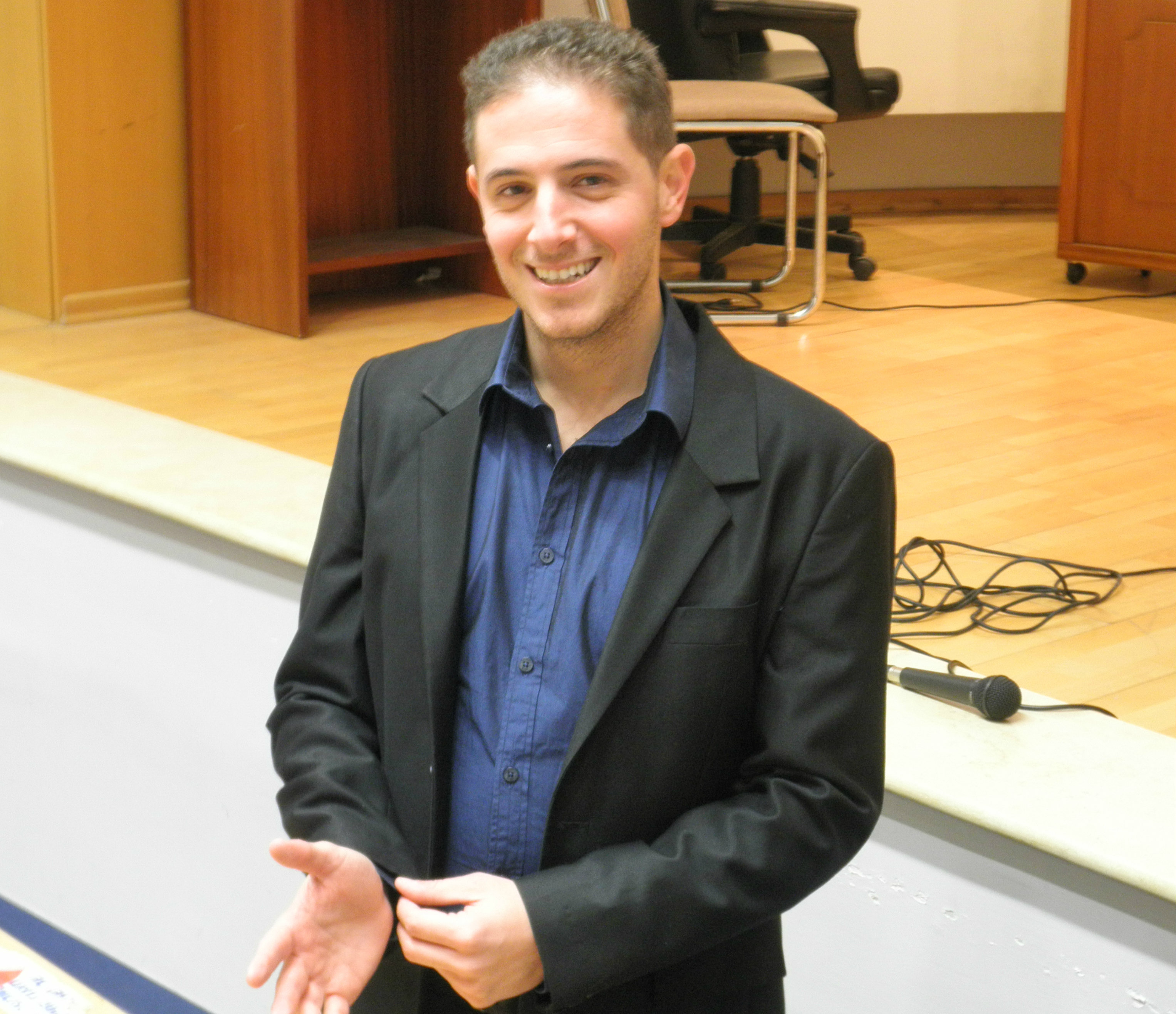 יוני כהן אידוב